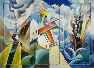 Dinamismo di Treno Nave Aereo , 1929 olio su tela cm. 93 × 125 Giulio D'Anna